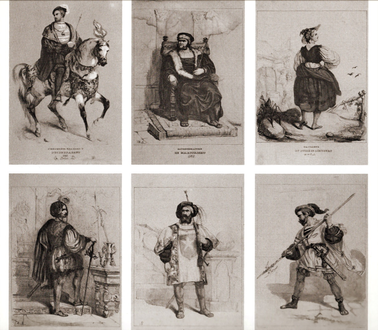 Zes van de tien kleurenlithografieën met klederdrachten uit de tijd van Karel V, vervaardigd door Théodore Schaepkens naar aanleiding van de historische cavalcade De Blijde Inkomste van Keizer Karel V in Maastricht in 1520, georganiseerd door de Sociëteit Momus in 1841. Collectie RHCL Maastricht (GAM).